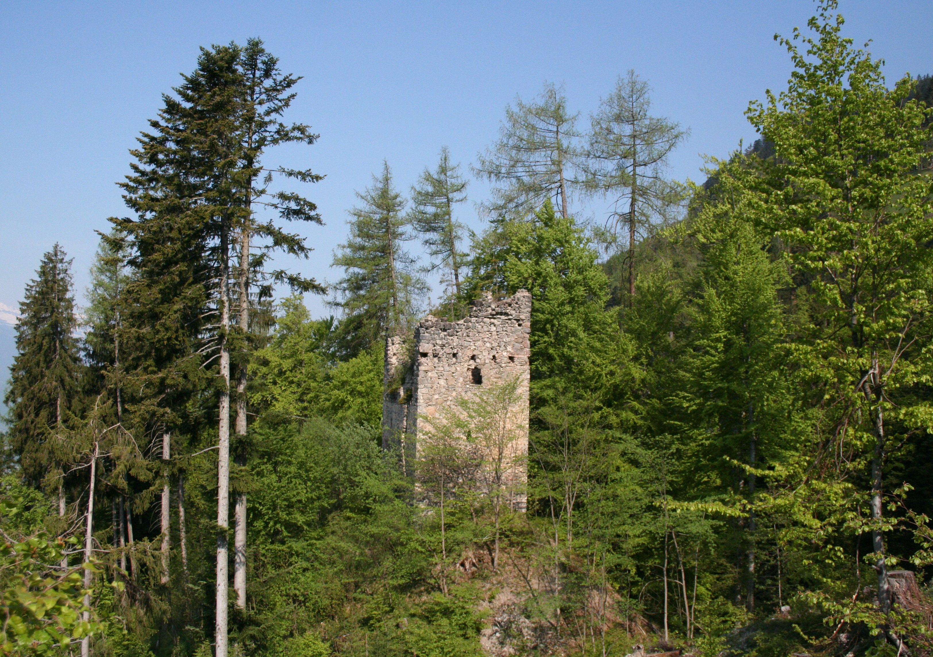 Ruine Klingenhorn, Ansicht von Osten